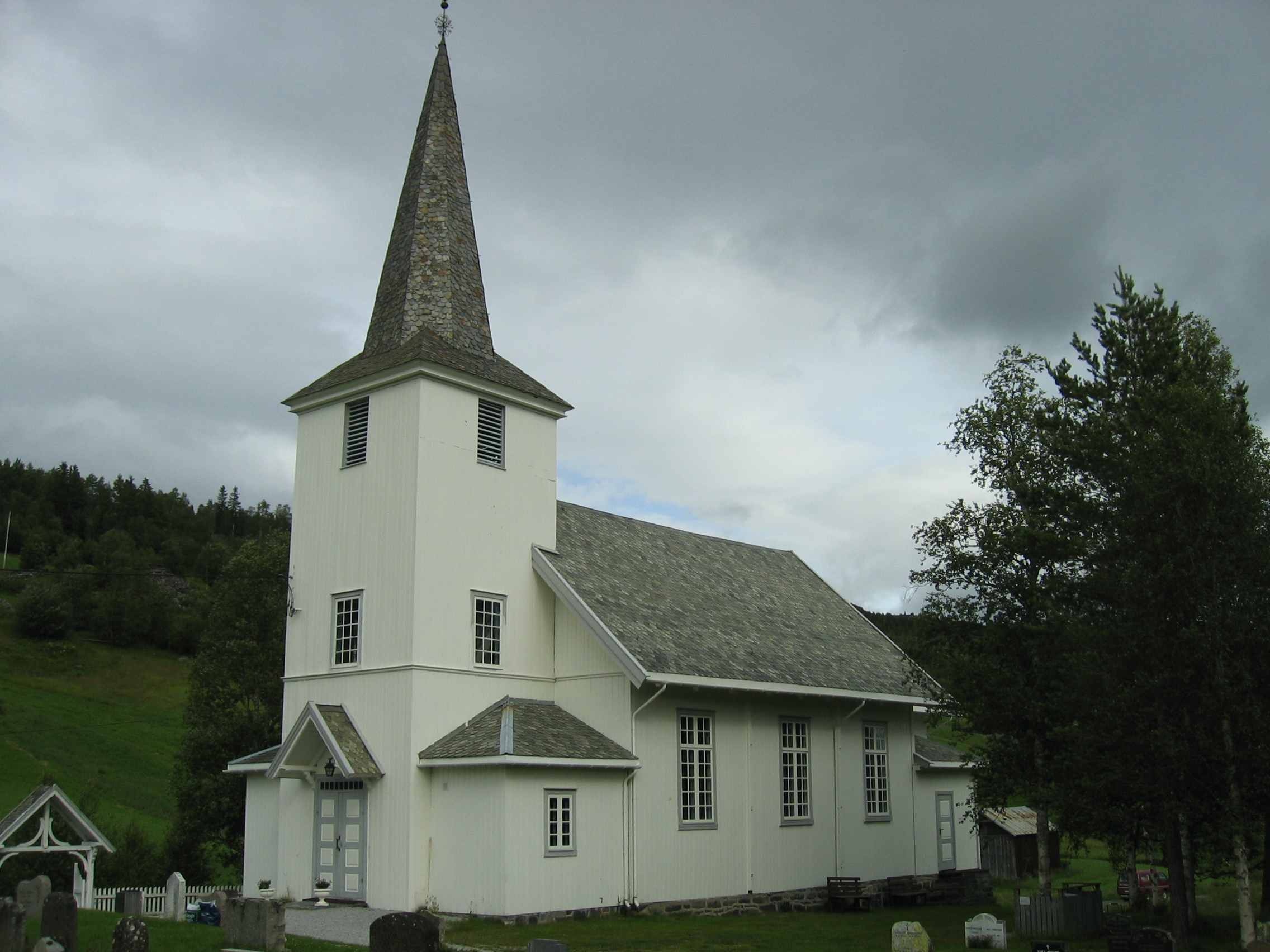 Leveld kyrkje, Buskerud, Norway